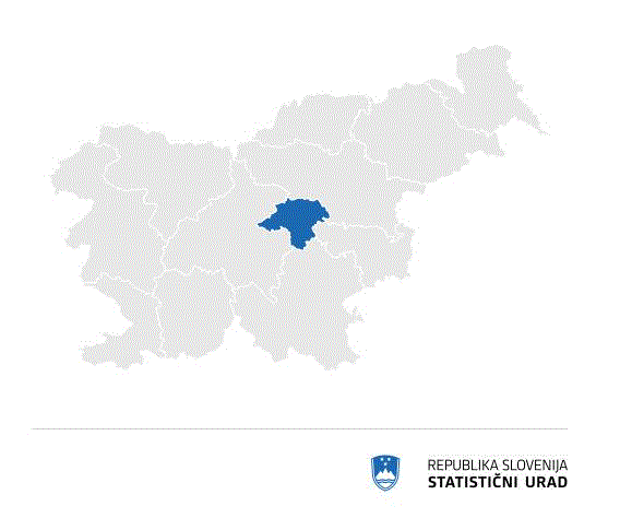 zasavska